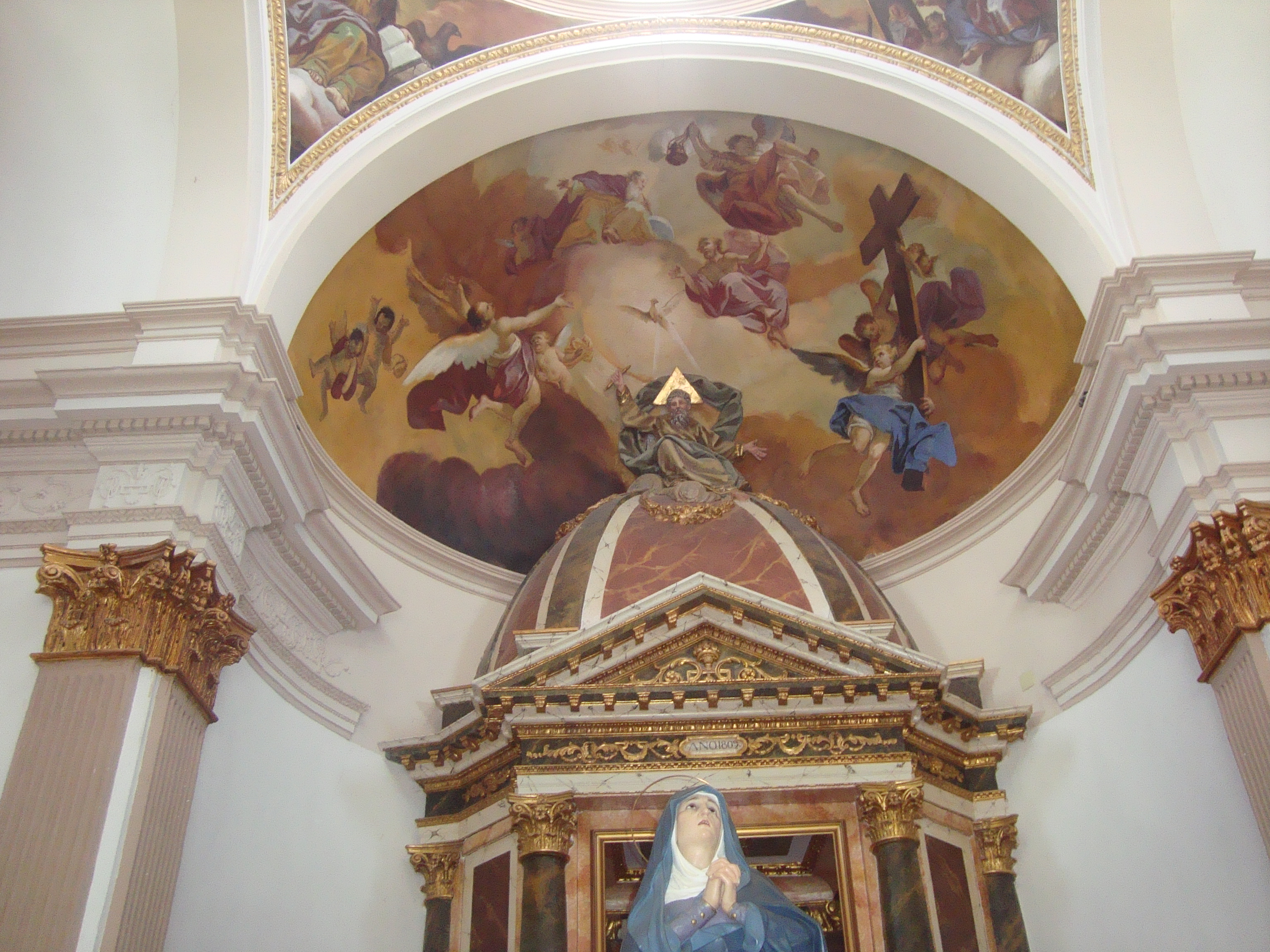 Ermita del Calvari de Vilanova d'Alcolea